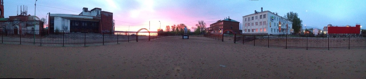 Камбарка Площадь